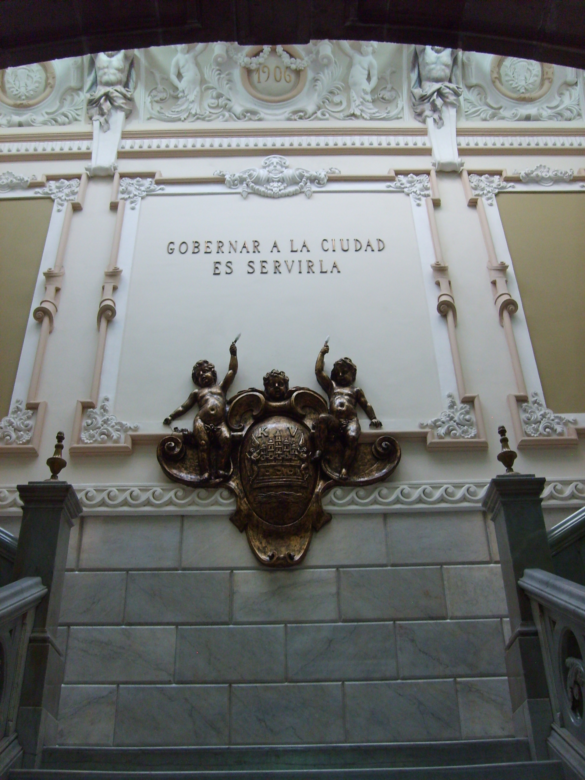 Escudo de Puebla arriba del arranque de la escalera del Palcio Municipal.